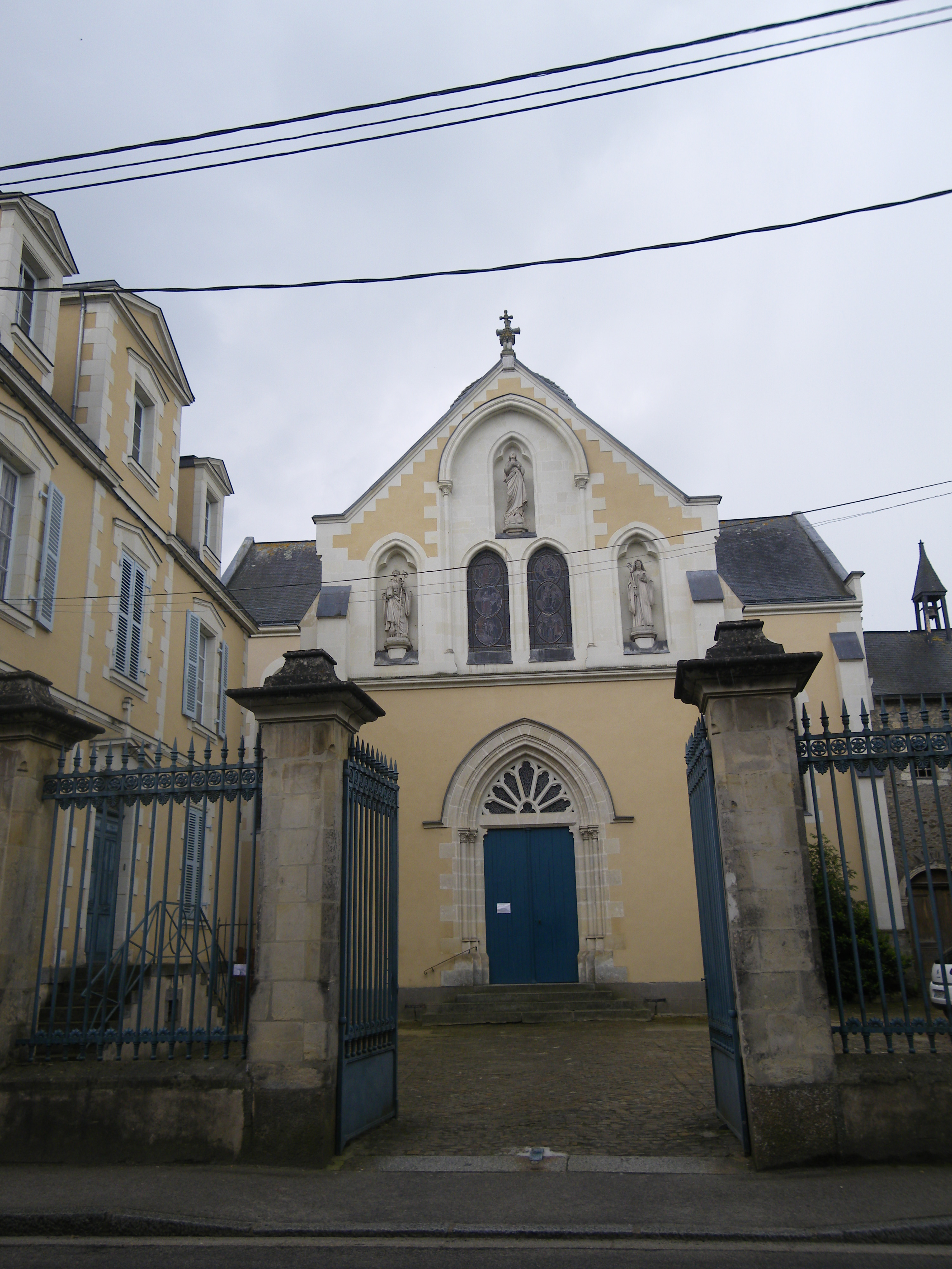 le couvent des benedictines a craon